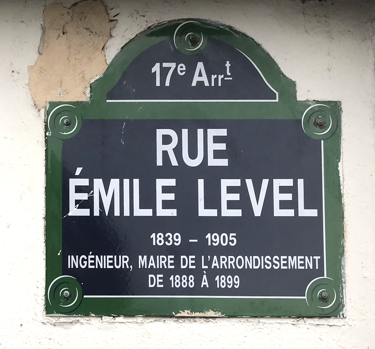 Image de Paris, septembre 2018.